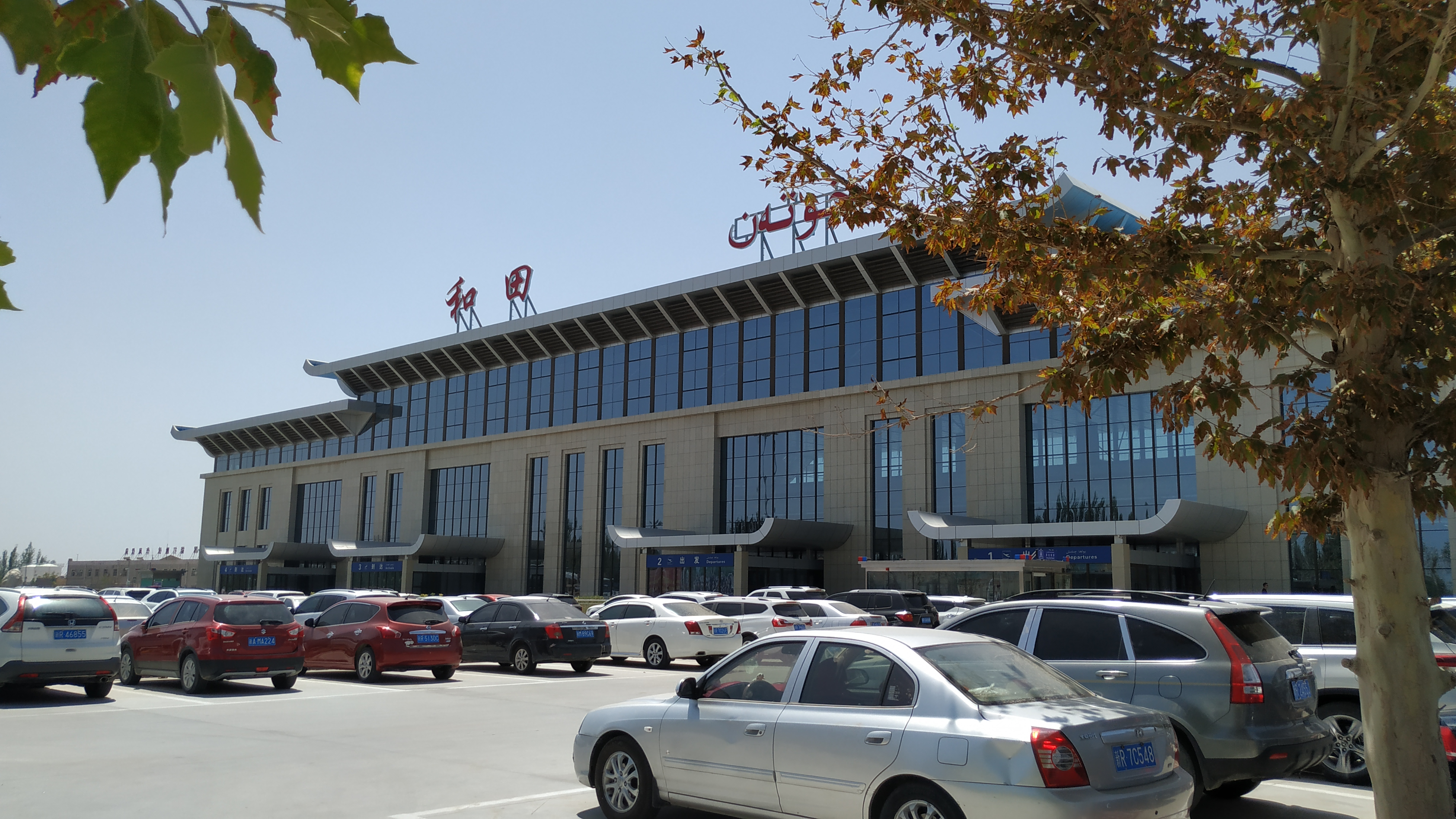 中文（中国大陆）: 和田机场航站楼